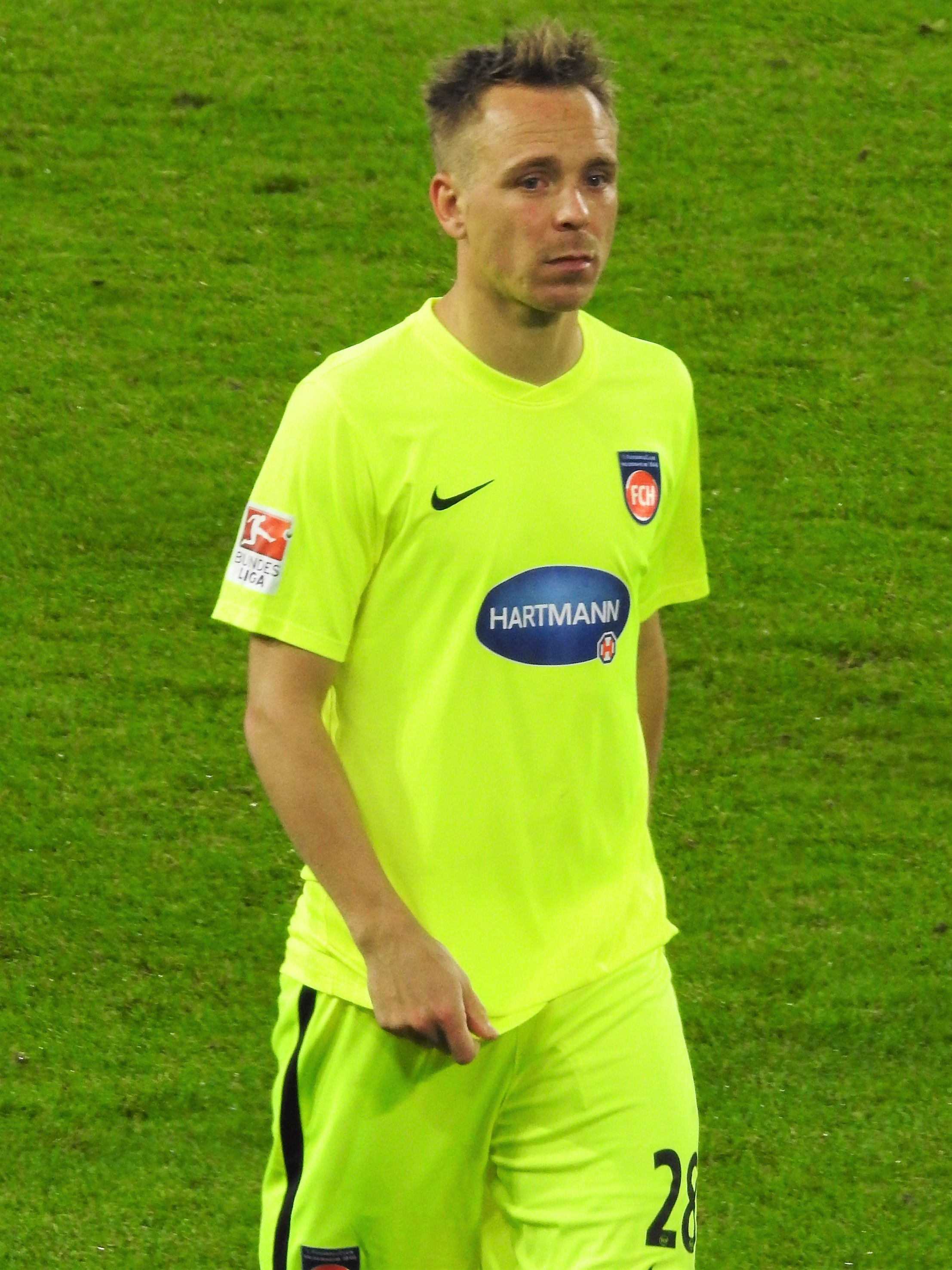 Arne Feick im Trickot von Heidenheim